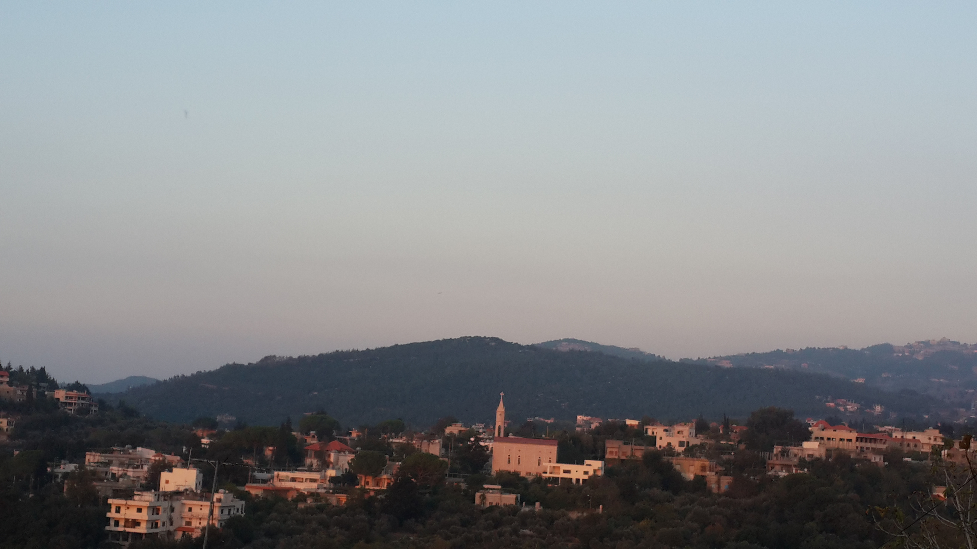 Une vue de Talet et Chattaha